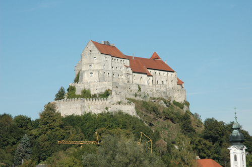 Burg zu Burghausen von Süden, von der österreichischen Seite der Salzach aus. Burghausen Castle from the Austrian side of the border (south).